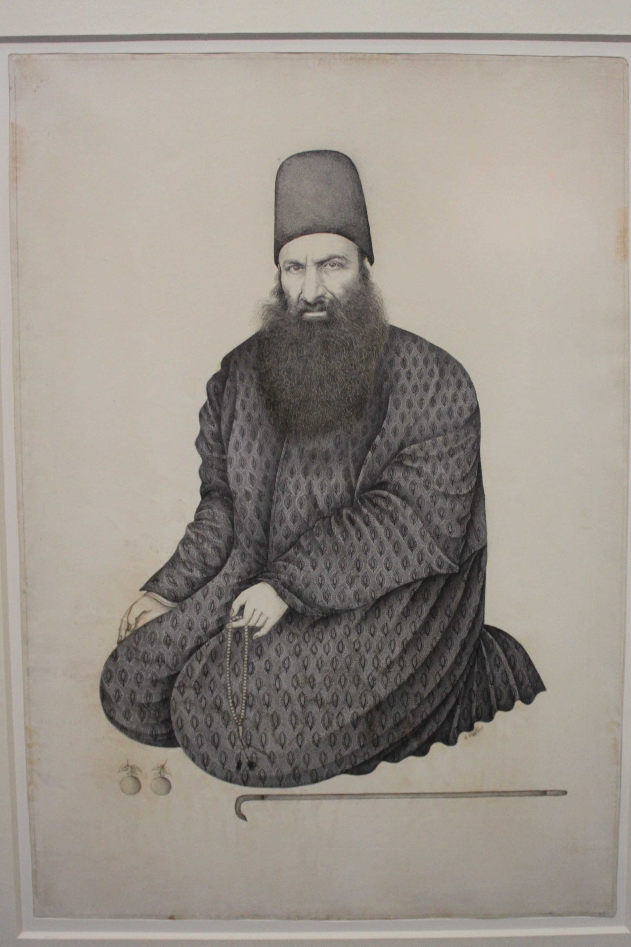 Portrait of Hadj Rukn al-Mulk Isfahani (1838-1912) - Iran - Tehran - 1880-1889 - Abu Turab Ghaffari - Louvre - MAO 775 - Lead pencil on paper.